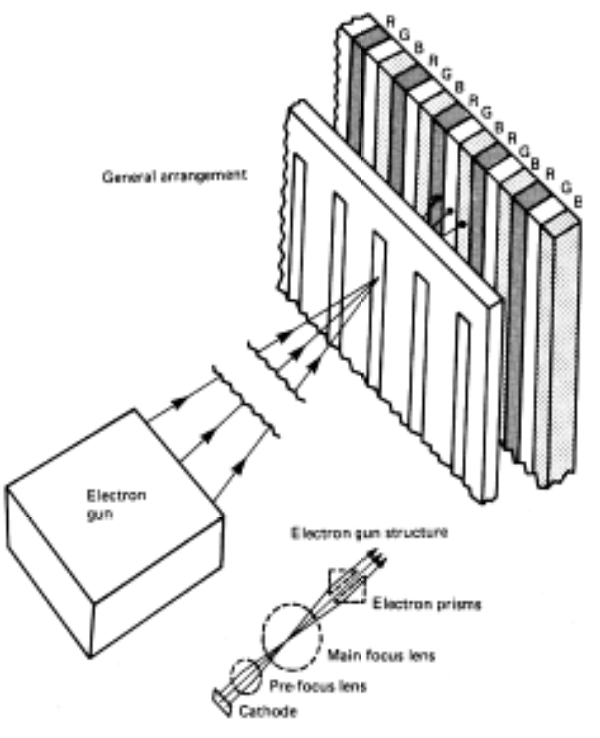 Croquis mostrando como funciona la grilla de apertura de un tubo tipo Trinitron (marca registrada), manufacturado por Sony.